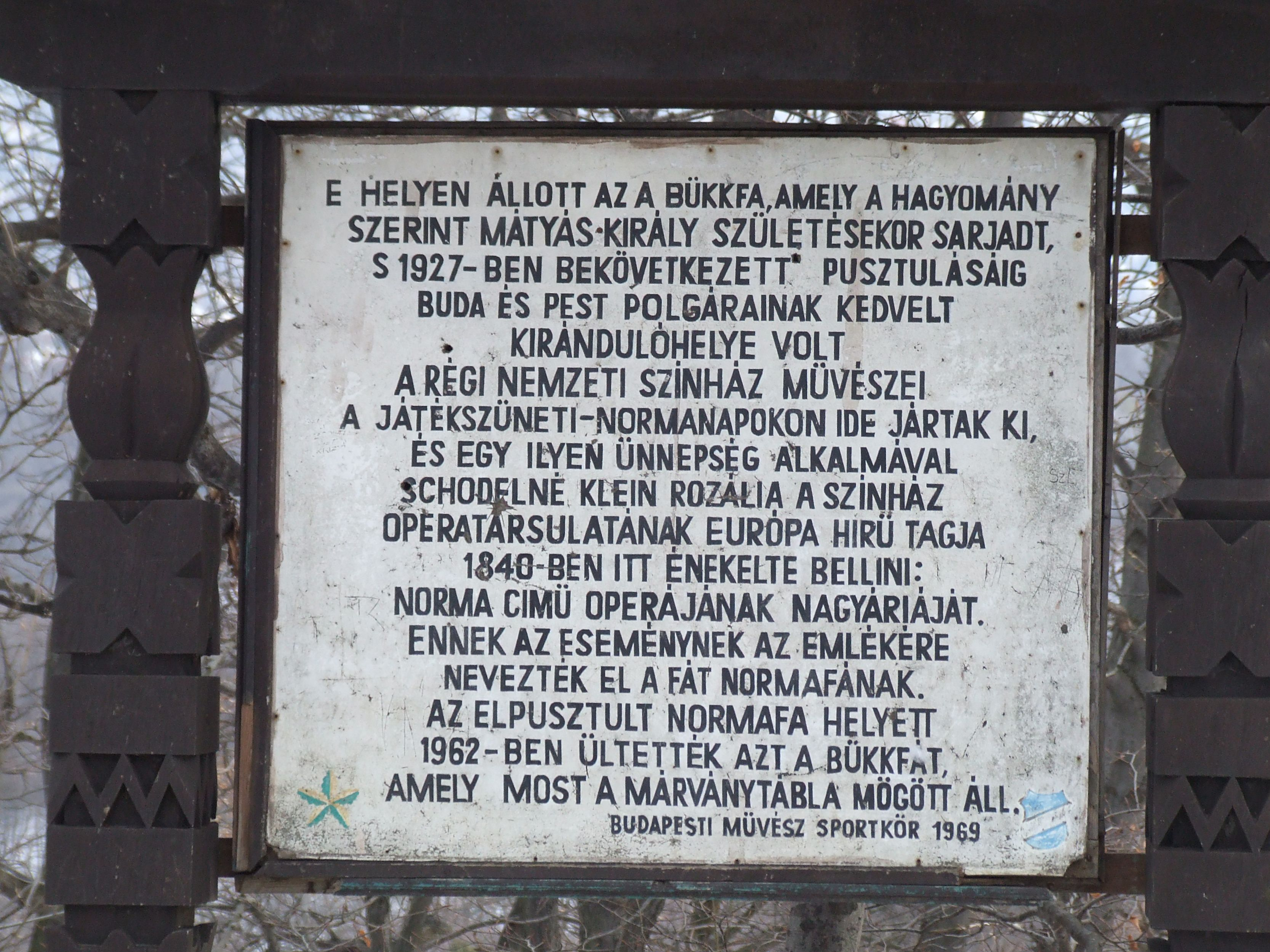 A Budapesti Művész Sportkör 1969-ben emelt emléktáblája Normafán (Budapest)